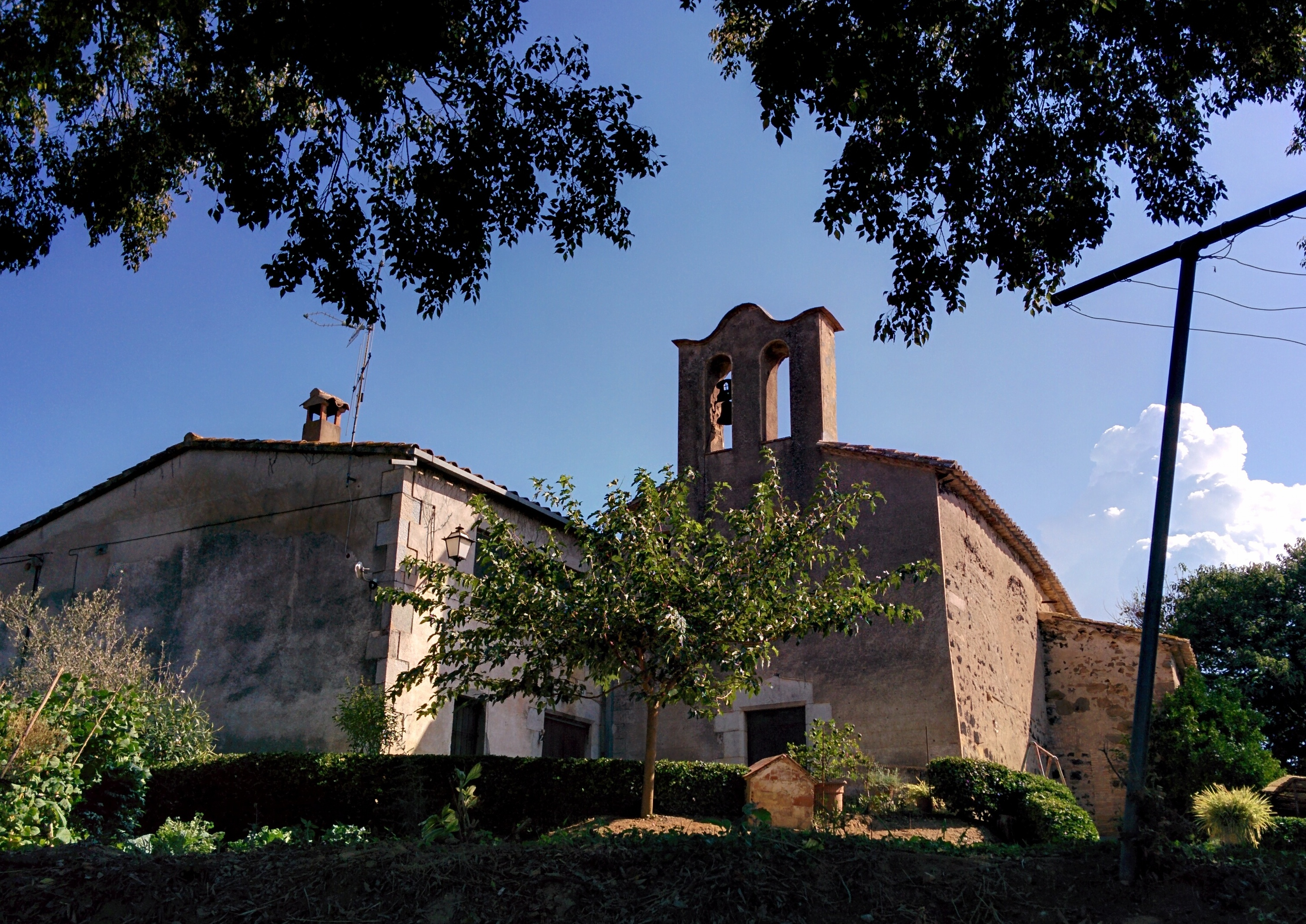 Capella de Santa Maria de Vilademany (Aiguaviva)